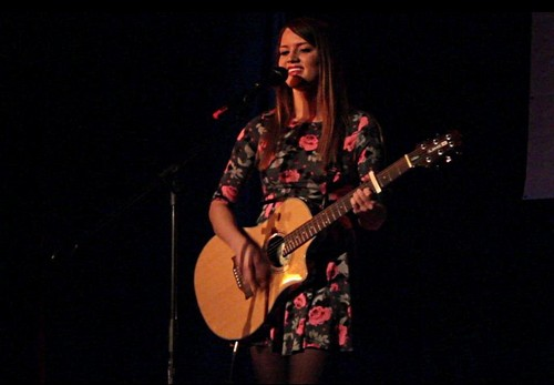 Kasia Popowska podczas występu w 2011 roku